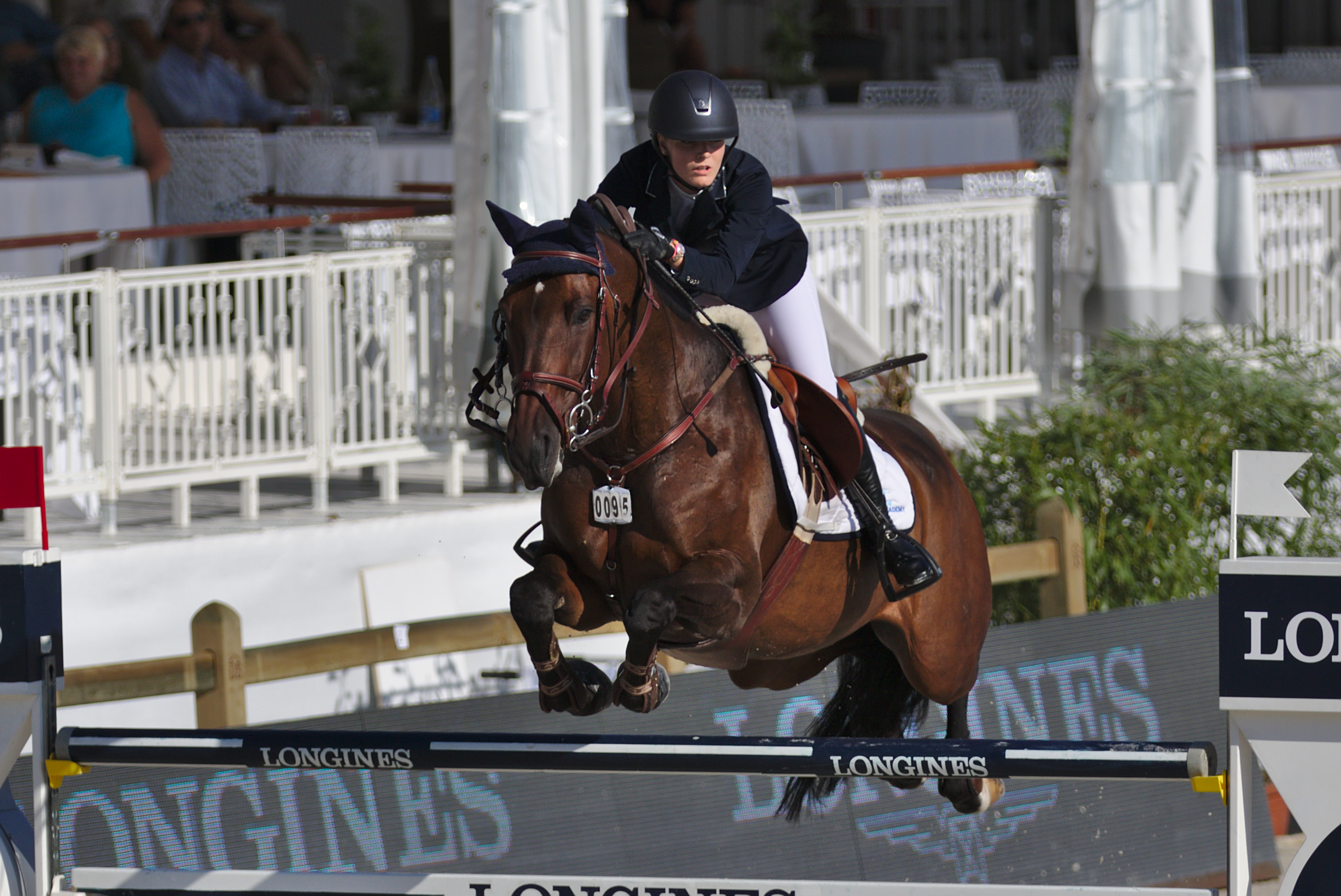 ILHS 2016 - 20160909 - Laetitia du Couedic et Cheyenne 111 Z